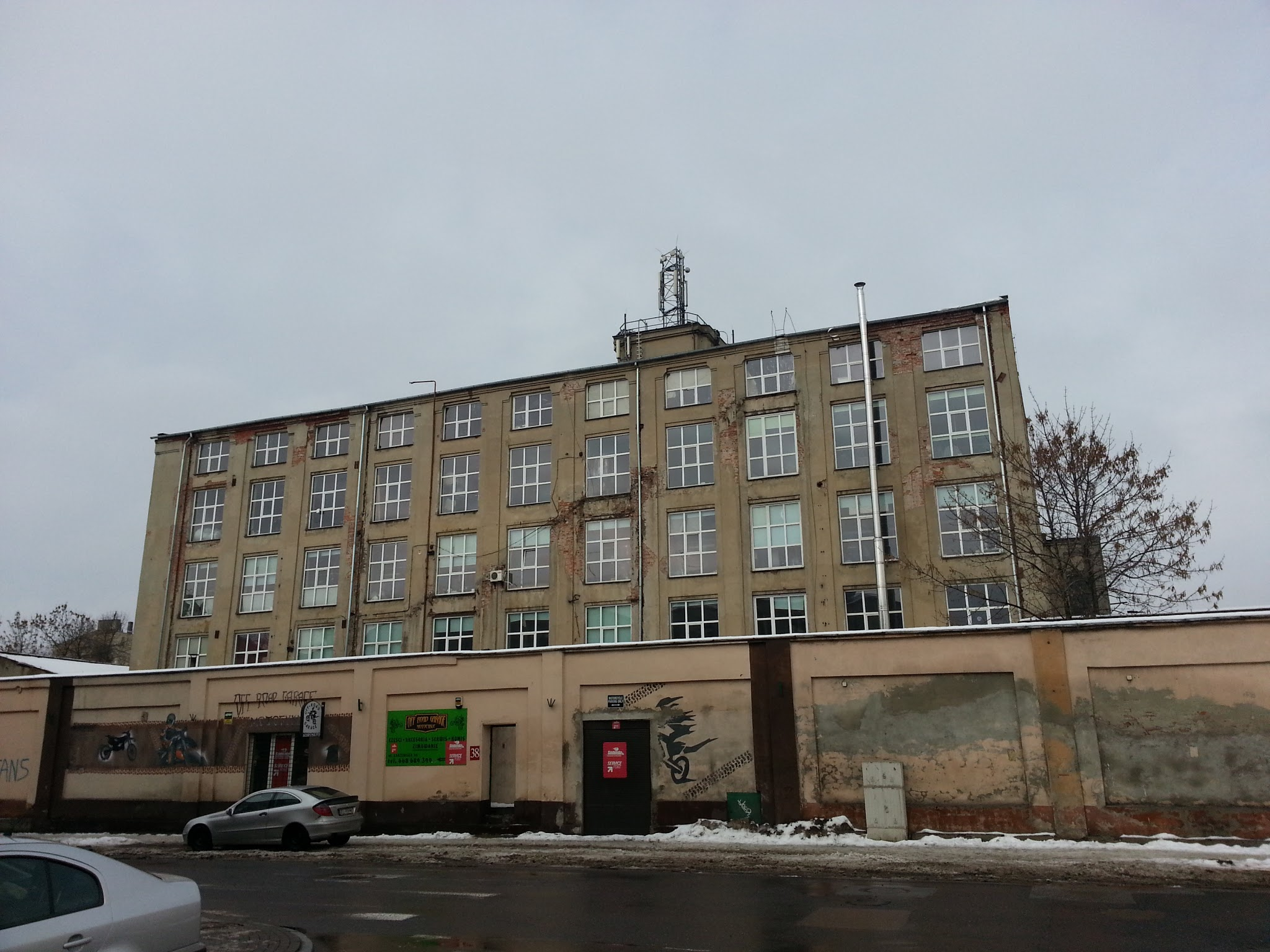 ul. Praska 5/7, Łodzi (widok od ulicy Zarzewskiej)